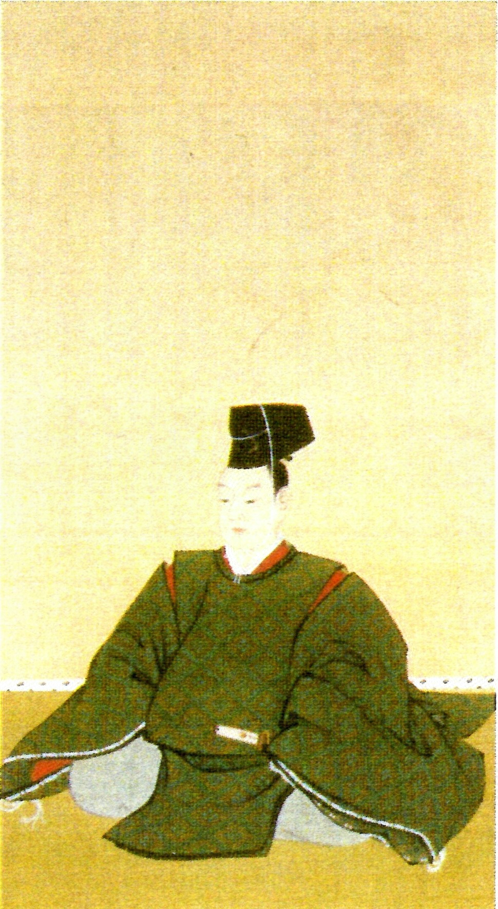 浅野長友の肖像。